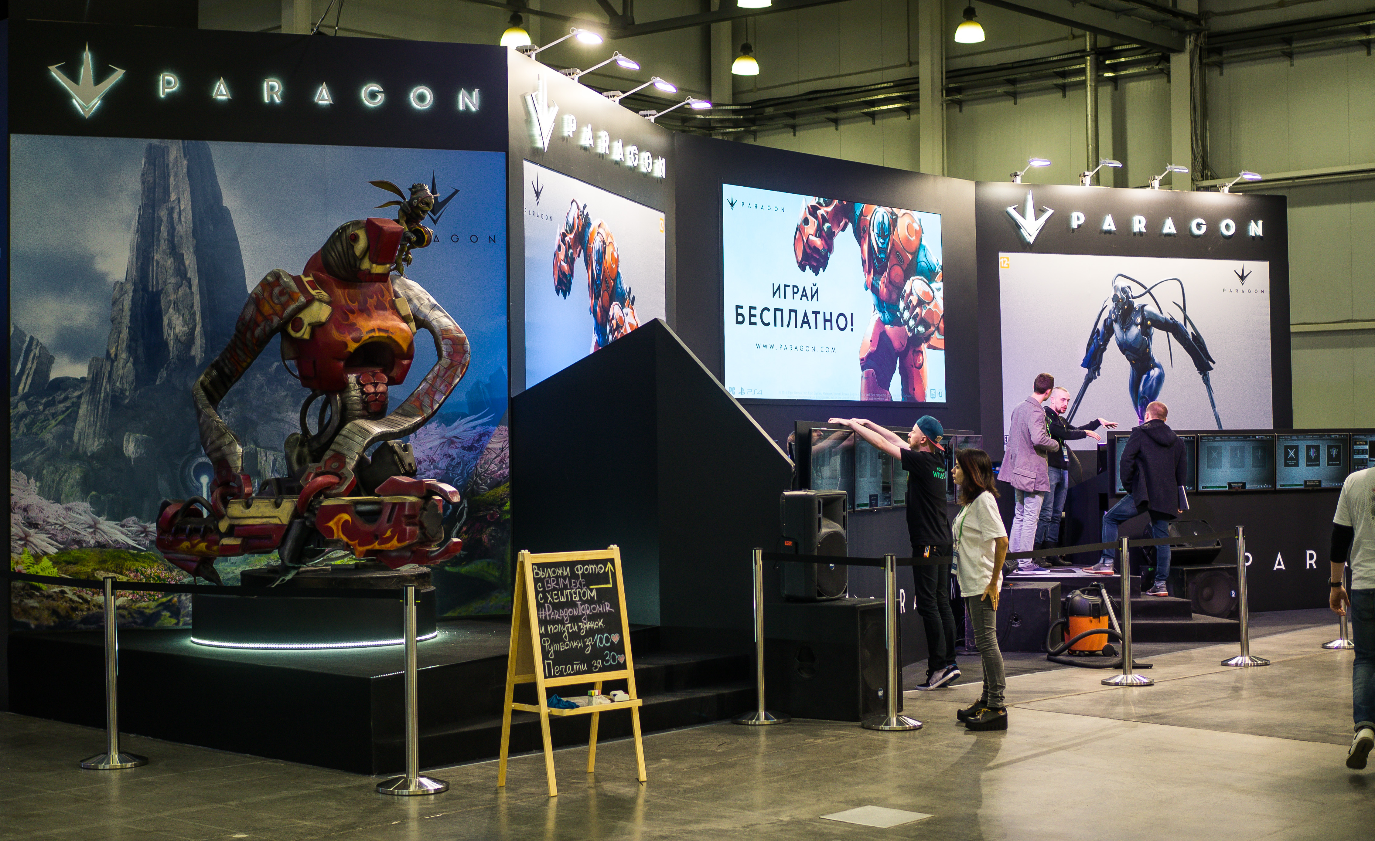 day 2